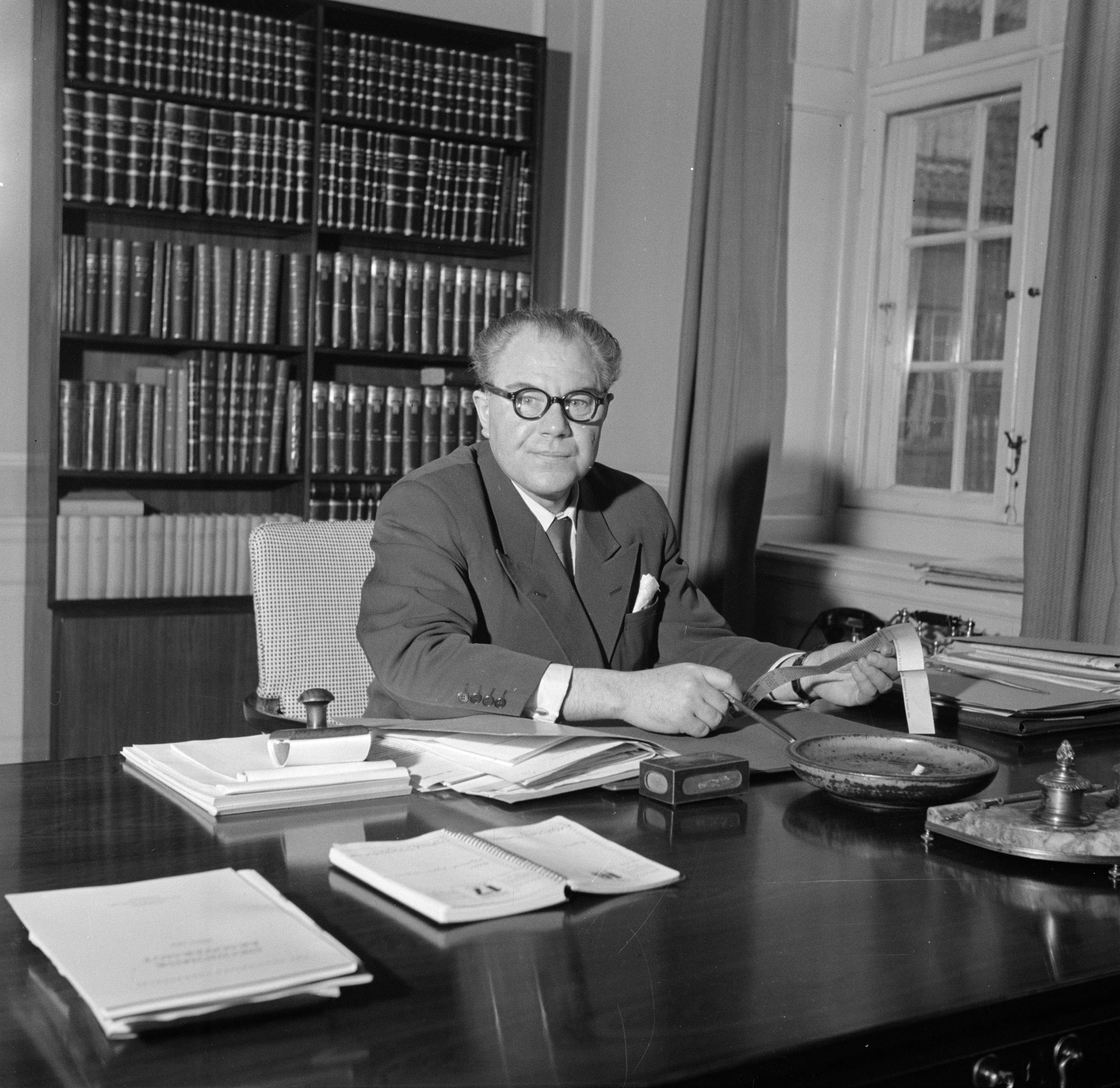 Collectie / Archief : Fotocollectie Van de Poll Reportage / Serie : Bezoek aan minister president Hedtoft en zijn gezin Beschrijving : Hans Hedtoft achter zijn bureau op het ministerie Datum : maart 1954 Locatie : Denemarken, Kopenhagen Trefwoorden : boeken, bureaus, kantoren, meubilair, ministeries, ministers-presidenten Persoonsnaam : Hedtoft, Hans Fotograaf : Poll, Willem van de, [onbekend] Auteursrechthebbende : Nationaal Archief Materiaalsoort : Negatief (zwart/wit) Nummer archiefinventaris : bekijk toegang 2.24.14.02 Bestanddeelnummer : 252-8965